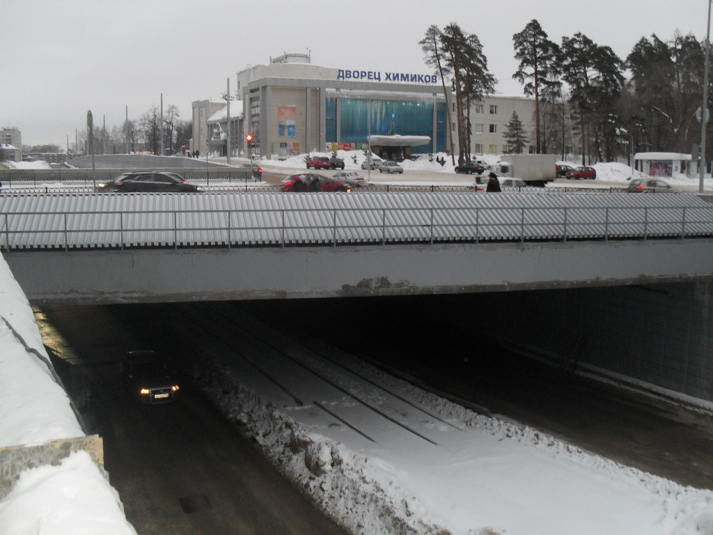 Двухуровневая транспортная развязка: Пересечение улиц Декабристов Ямашева Ленская (Казань). Элемент Большого Казанского кольца